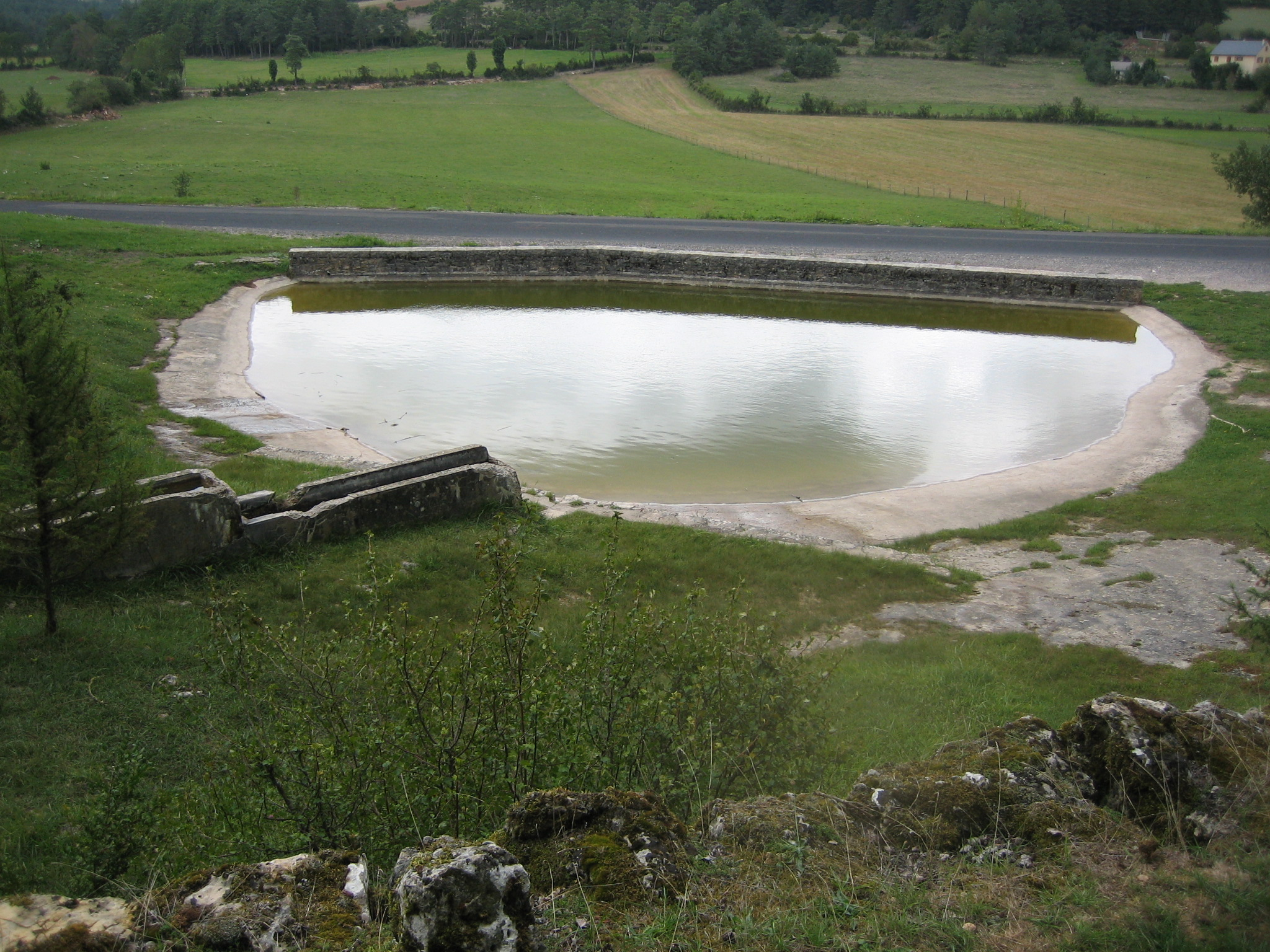 Lavogne, (une dépression, on a aménagé imperméable, p.e. pavé de terra rosa (terre rouge)) sur le Causse de Sauveterre.